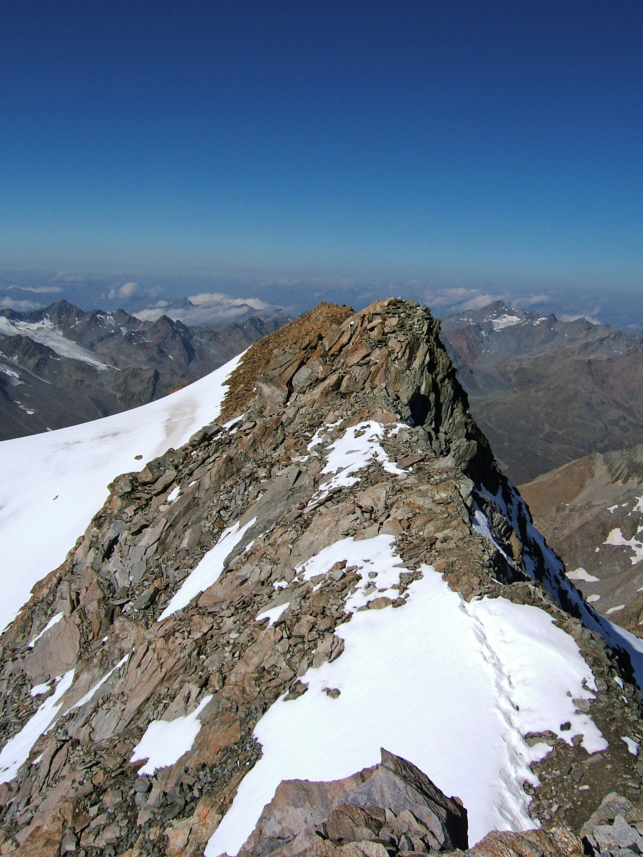 Gipfelgrat der Hochvernagtspitze, Blick nach Westen